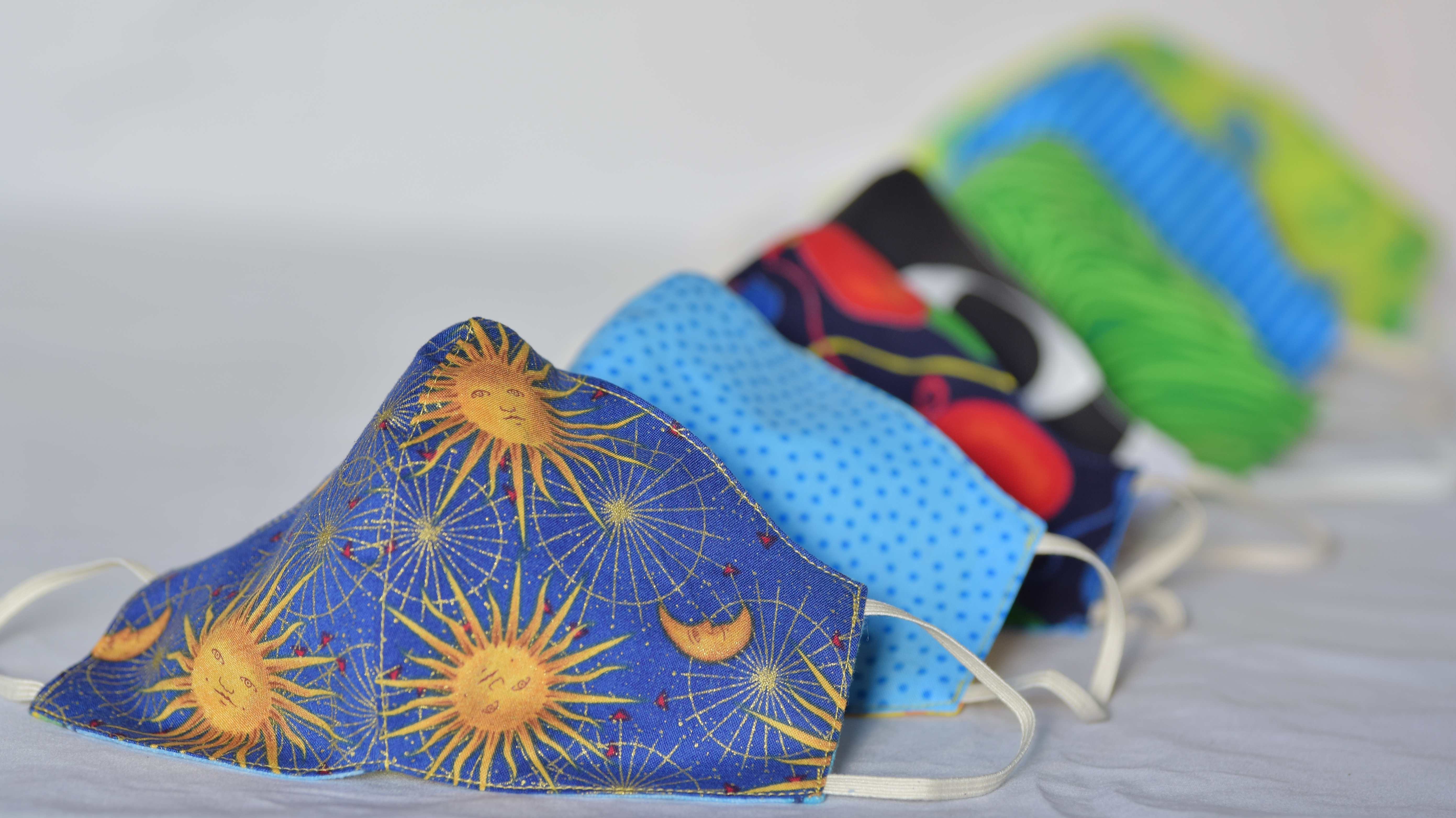 An die Gesichtsform angepasste, selbstgenähte Masken während der Coronakrise